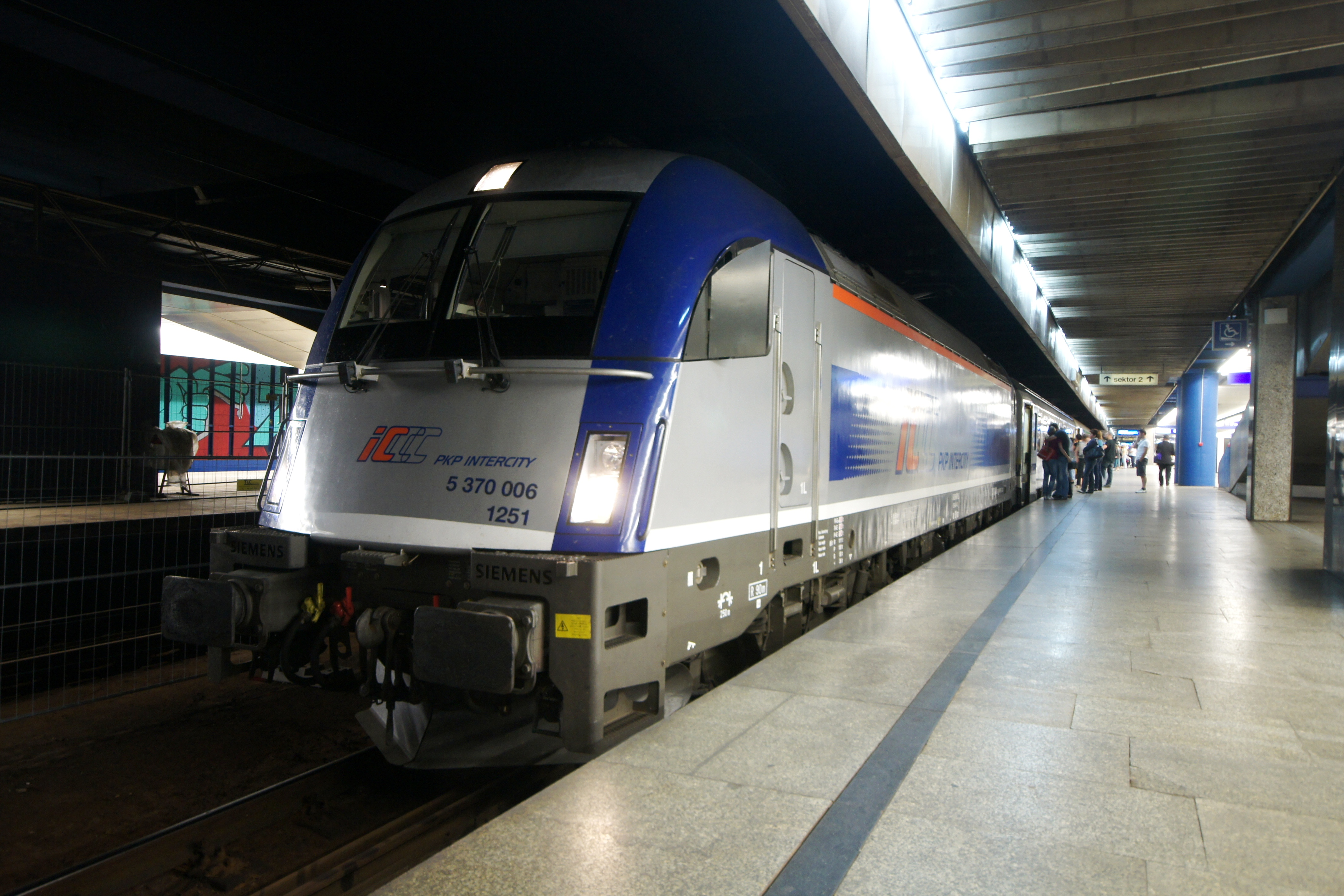 PKP Siemens Taurus EU44 przy peronie dworca Warszawa Centralna.